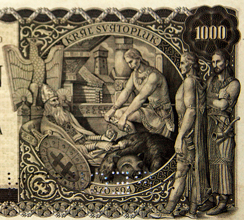 Vyobrazenie kráľa Svätopluka s tromi synmi Mojmírom II., Svatoplukom II. a Predstavom slovenským maliarom Štefanom Bednárom